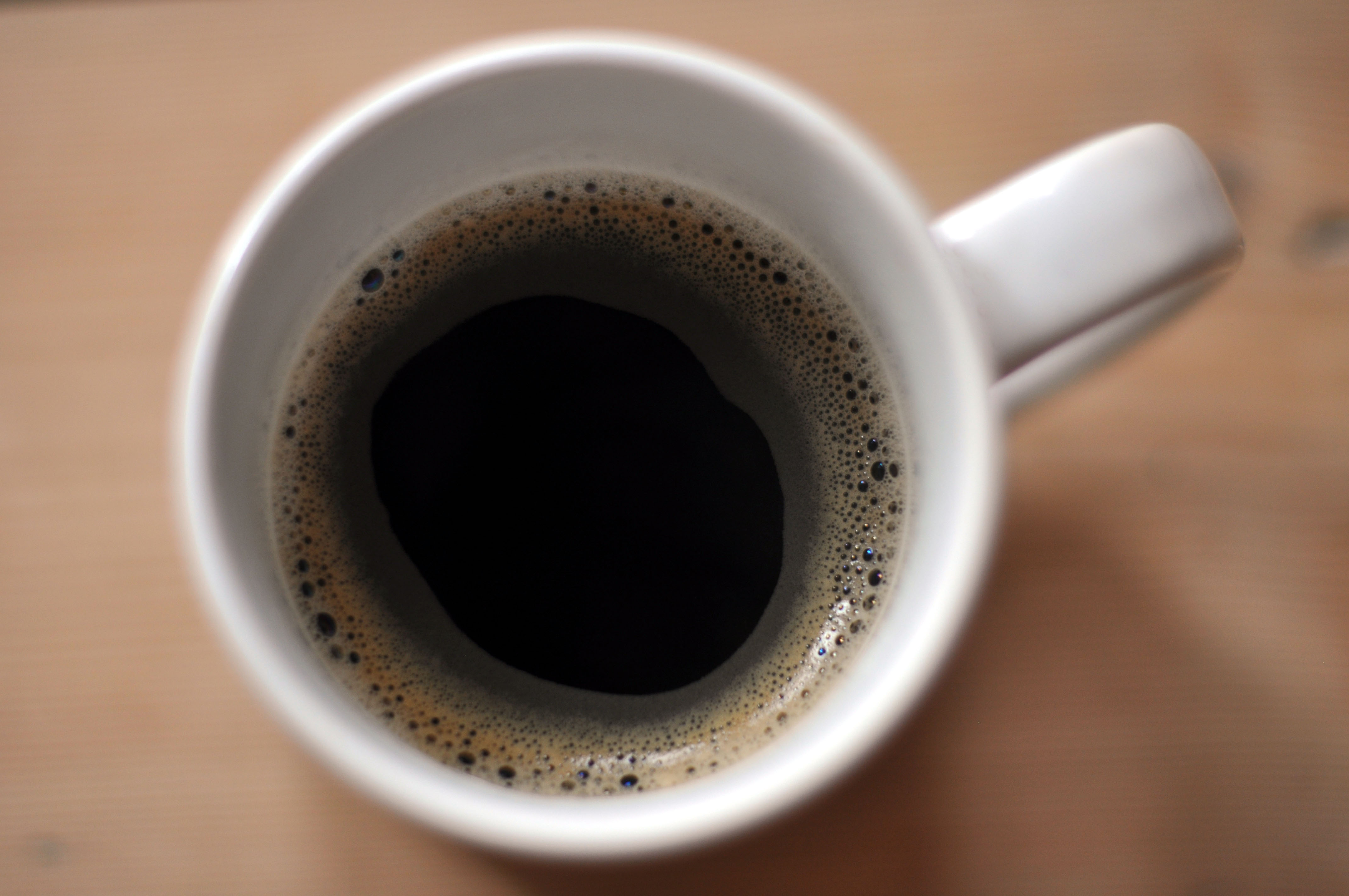 Kaffe